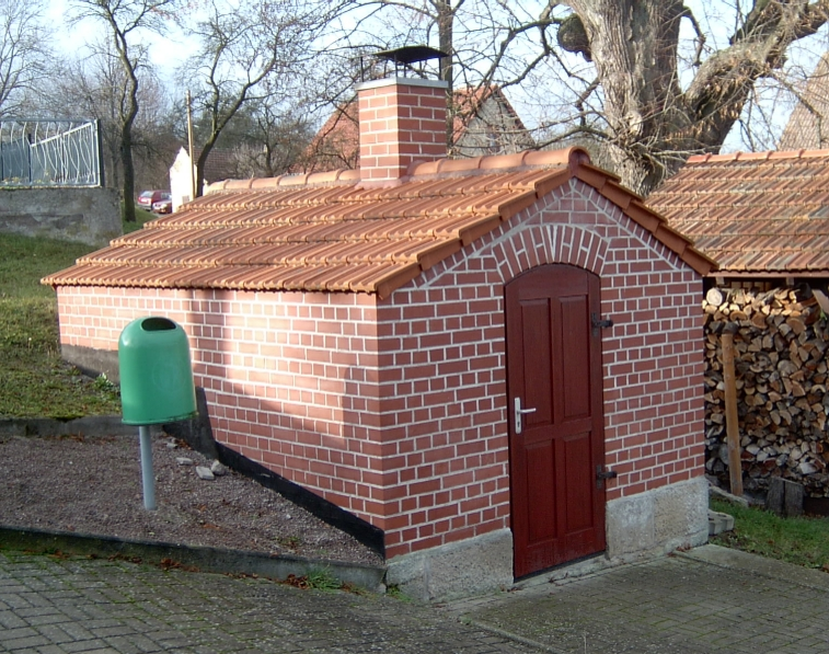 In diesem Backhaus in Rippersroda (Thüringen) wurde vor wenigen Jahrzehnten noch regelmäßig von den Bewohnern gemeinsam Brot gebacken. Heute wird es nur noch bei Festlichkeiten genutzt.